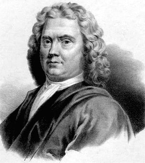 El historiador español del siglo XVI Gonzalo Fernández de Oviedo